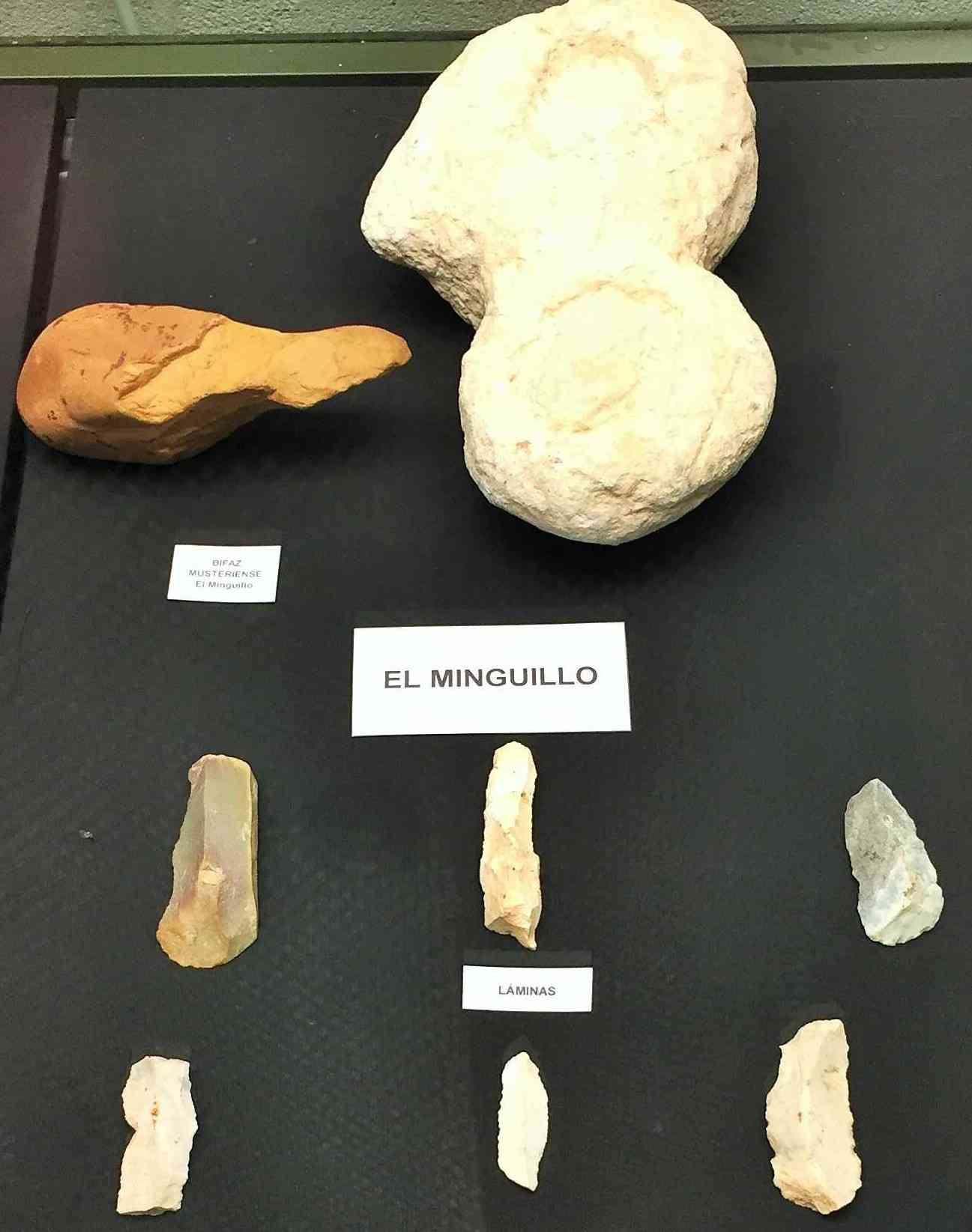 Útiles líticos descubiertos en el paraje "El Minguillo" y expuestos en el MACC.